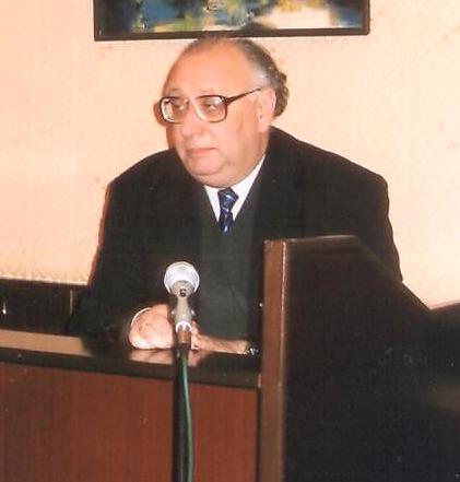 Слободяник Михайло Семенович